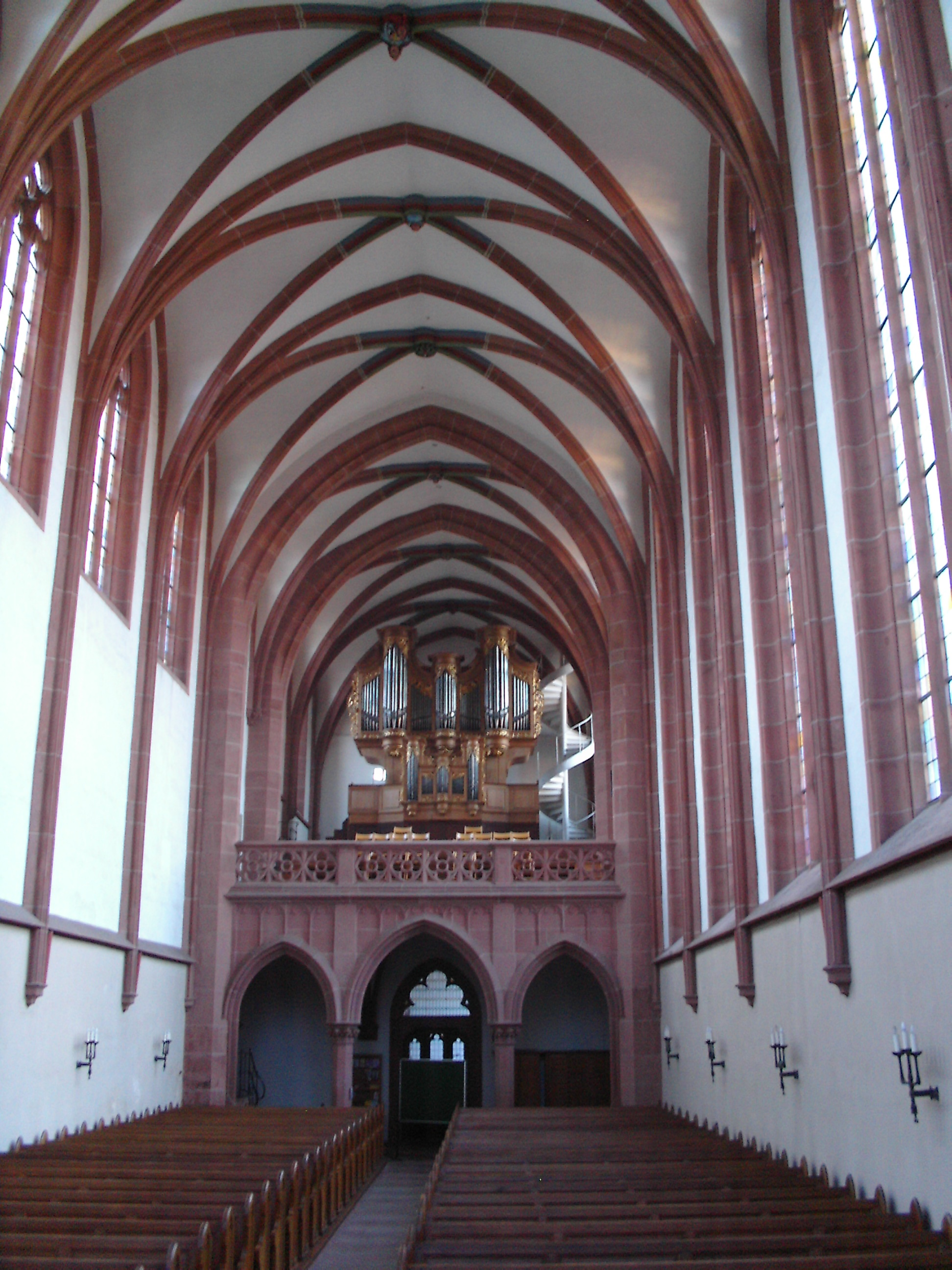 Klosterkirche Lambrecht (Pfalz), innen, gegen Westen